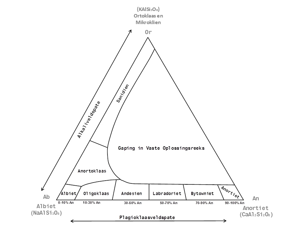 Veldspaat fasediagram